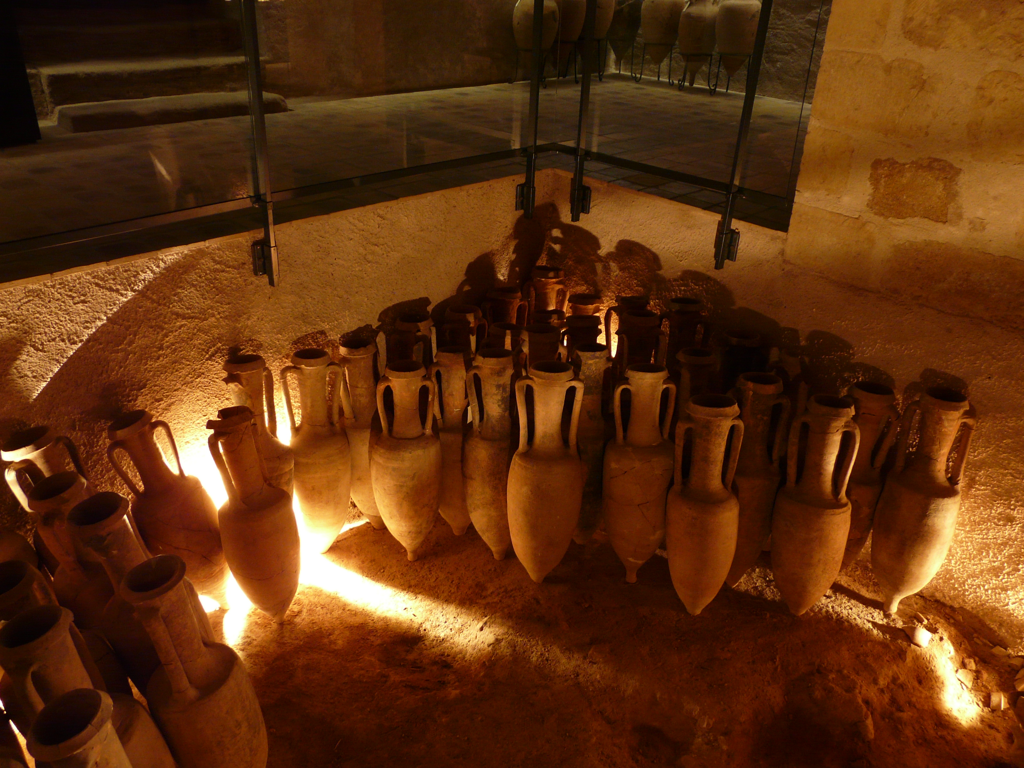 Reconstitution de la cave à amphores Gallerand 1972 découverte à Châteaumeillant